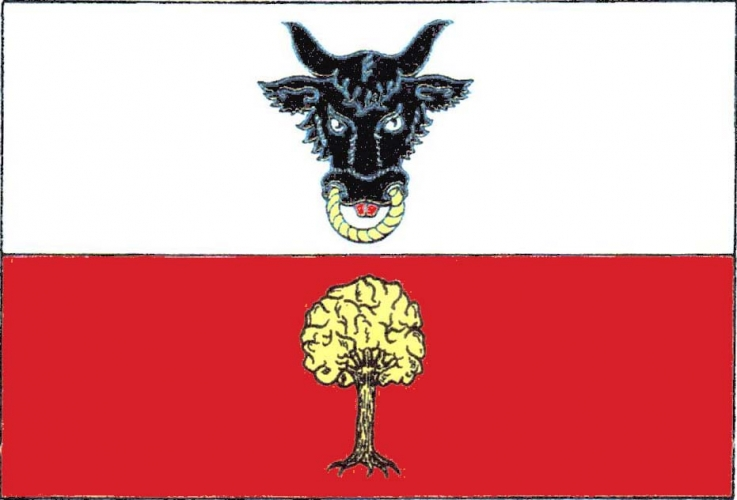 vlajka,Ujčov , okres Žďár nad Sázavou